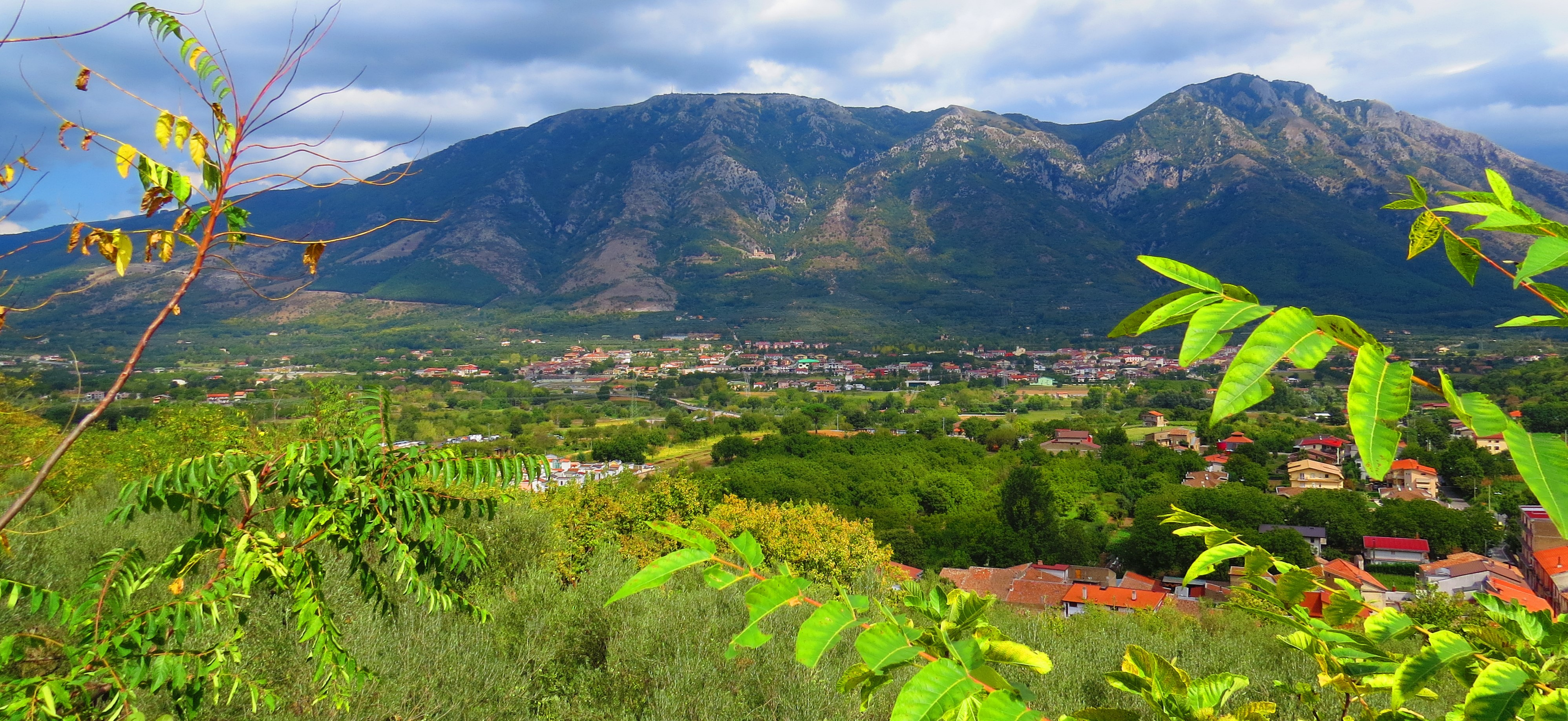 Airola (BN)